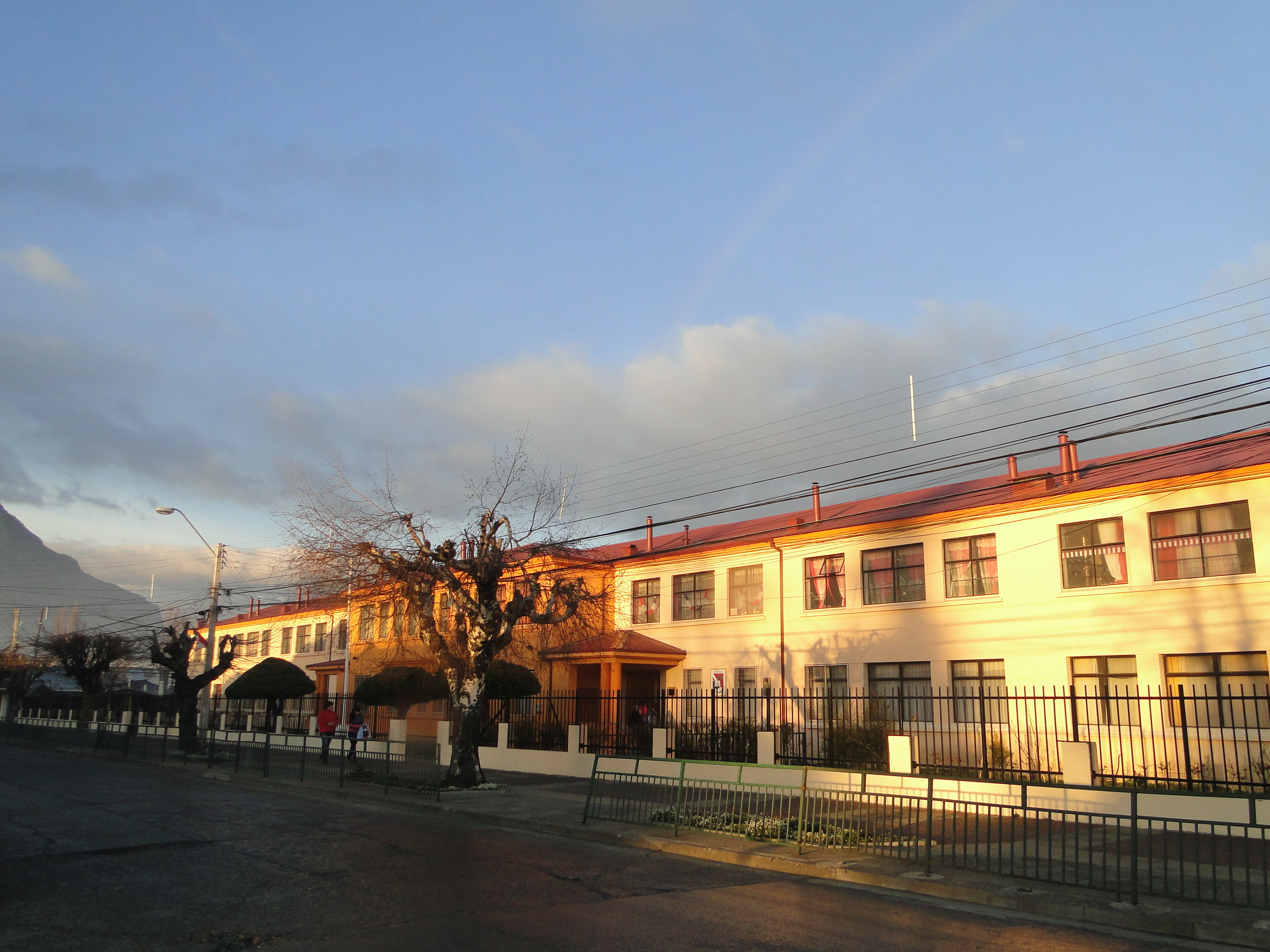 Escuela Pedro Quintana Mansilla This is a photo of a national monument in Chile: 1860